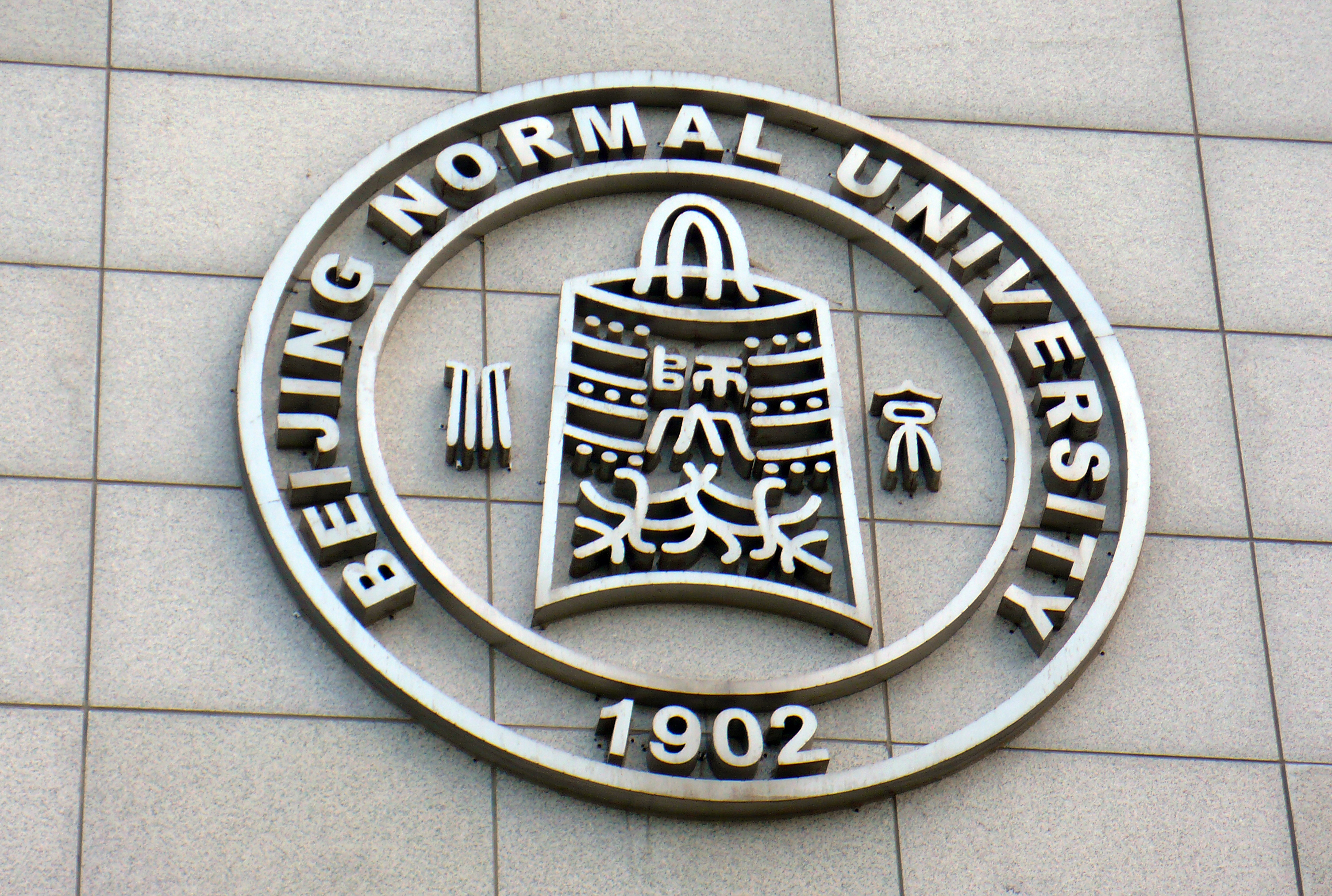 北师大校徽。